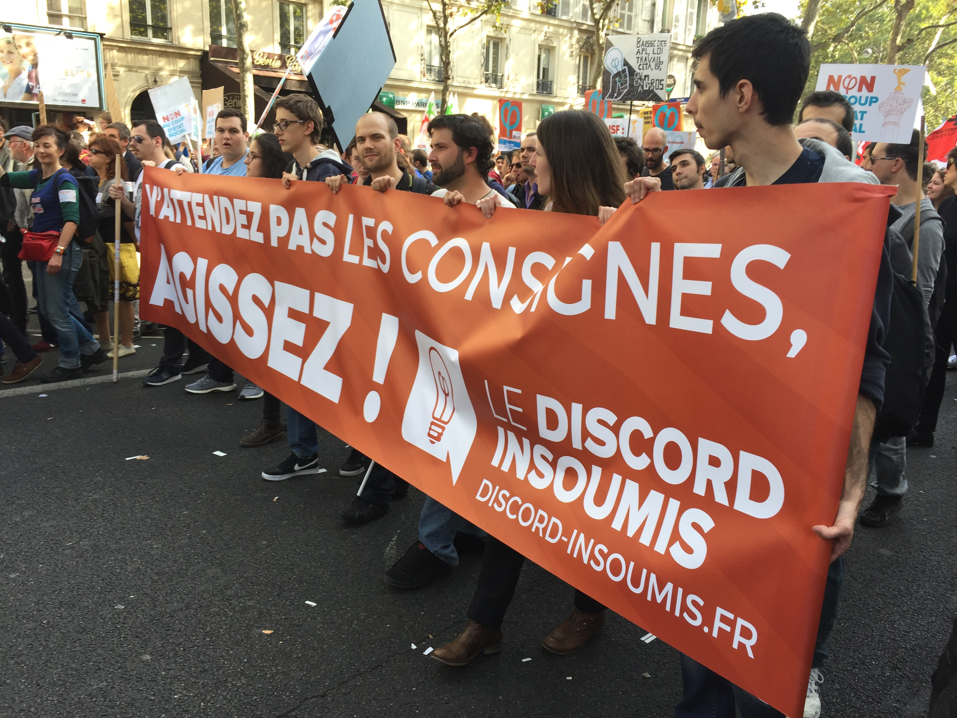 Le cortège du Discord insoumis lors d'une manifestation contre le projet de réforme du code du travail, le 23 septembre 2017.